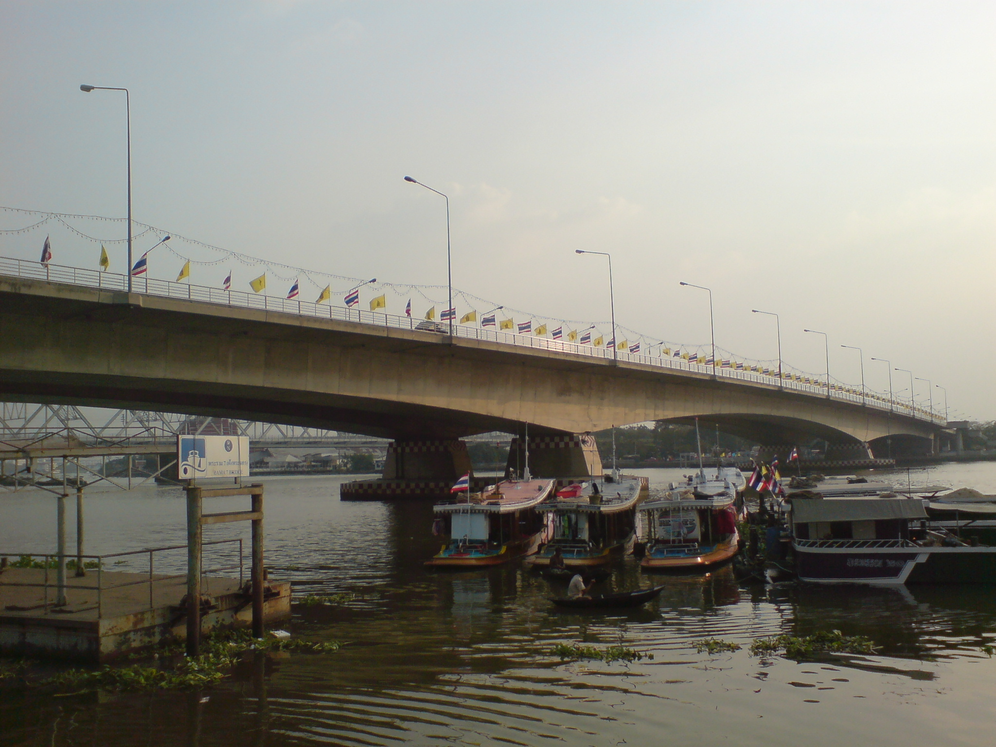 Rama VII Bridge